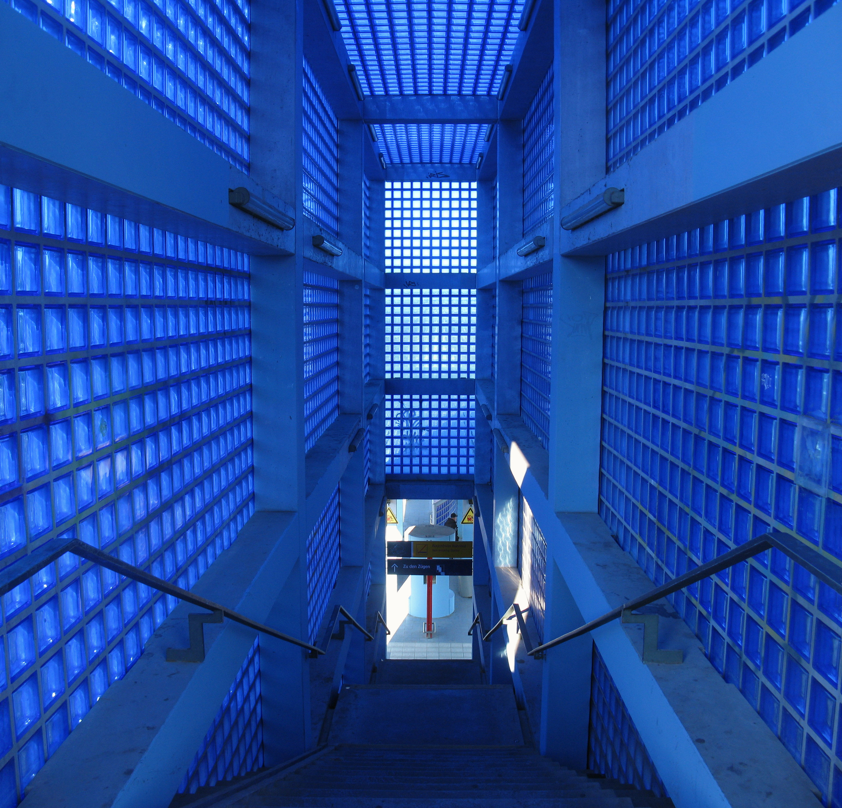 S-Bahnhof Hannover-Nordstadt: Innenansicht